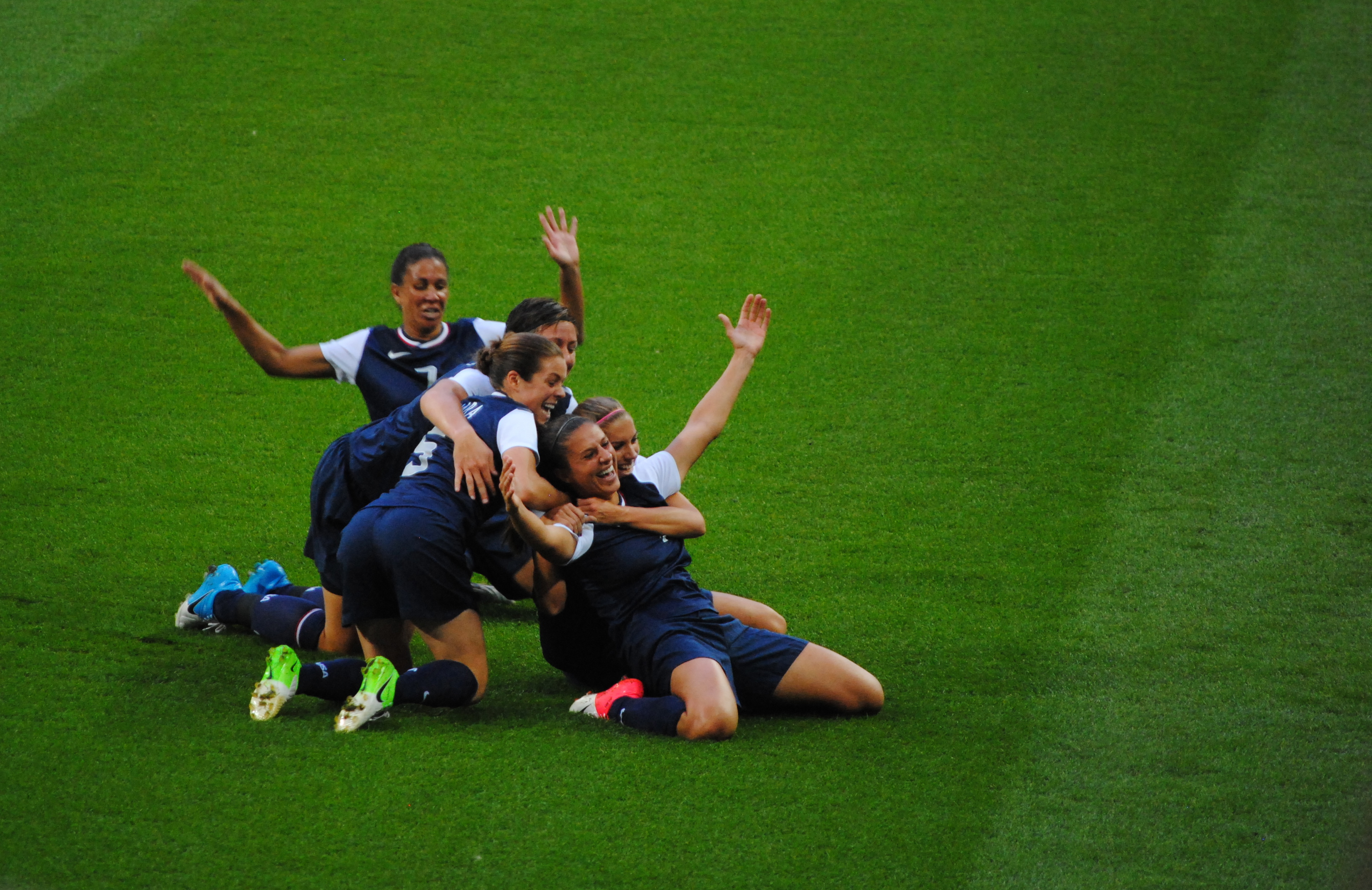 USA vs Japan